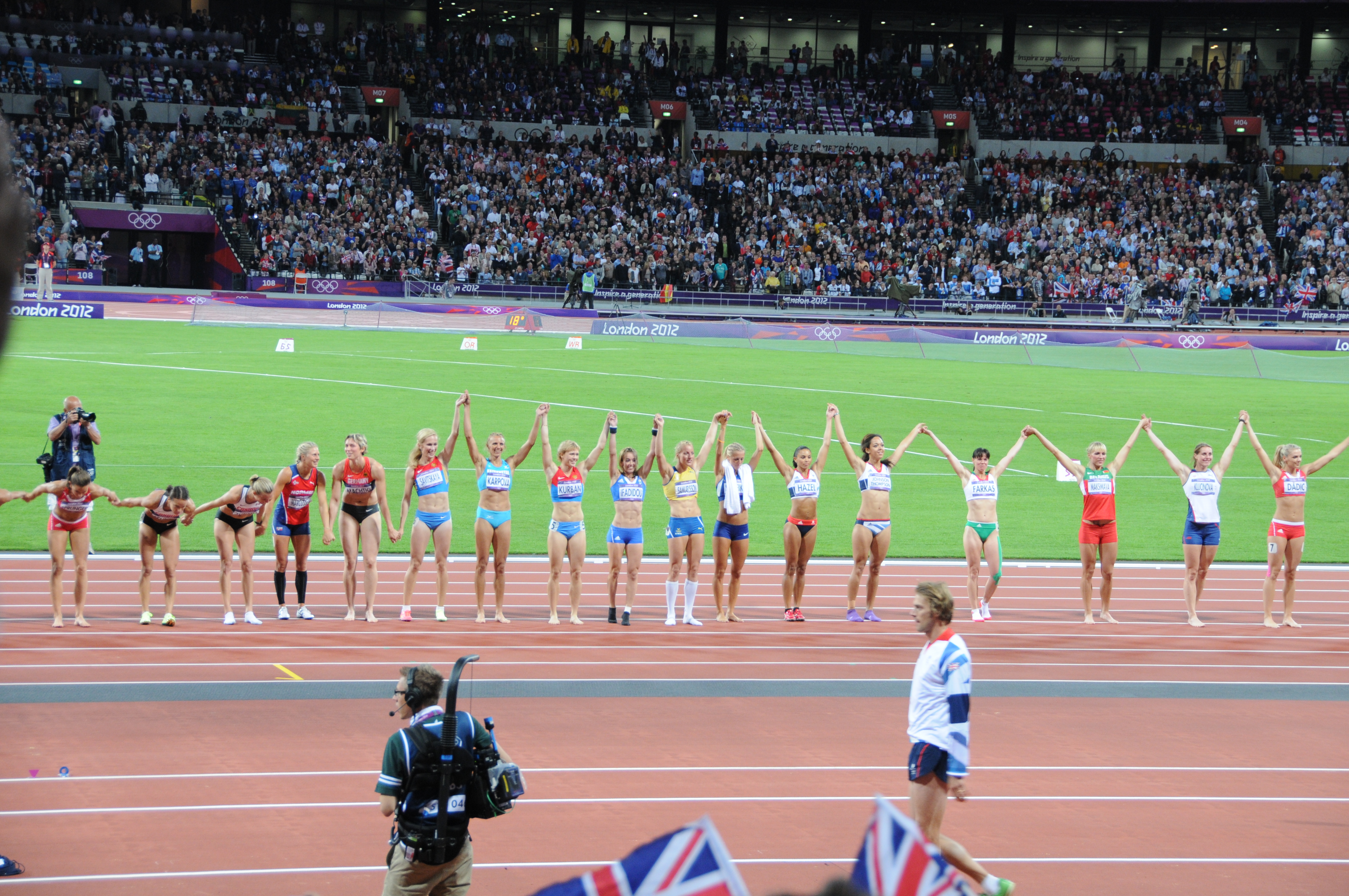 Défilé des athlètes de l’heptathlon après la fin de la compétition aux JO de Londres